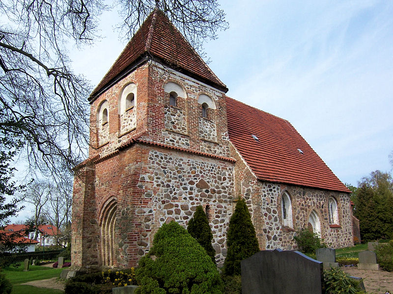 Kirche in Thulendorf, Landkreis Bad Doberan